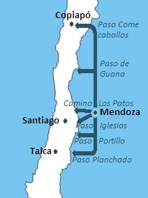 Mapa con los pasos fronterizos donde cruzó el Ejército Libertador de Los Andes